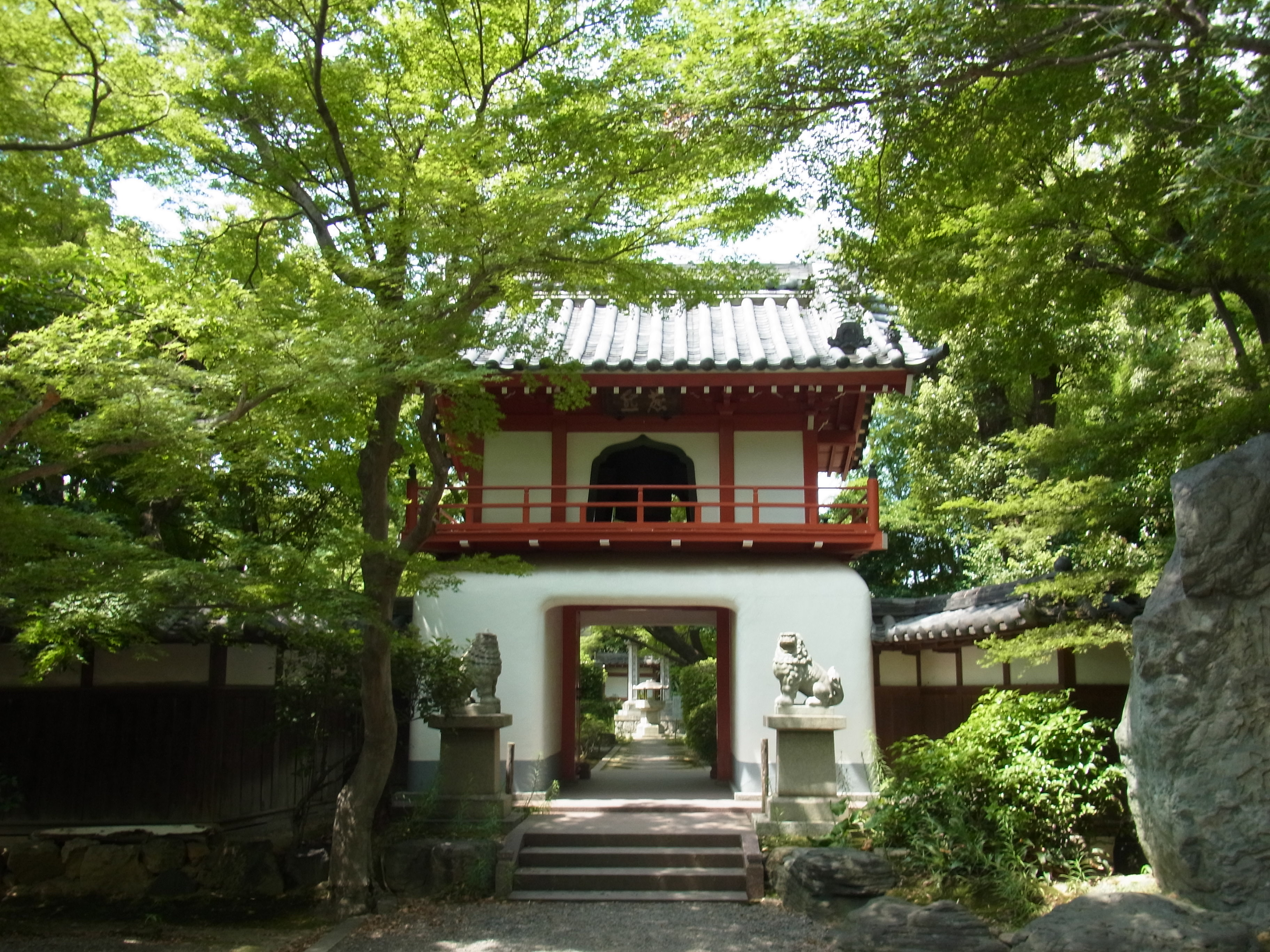 桃巌寺山門